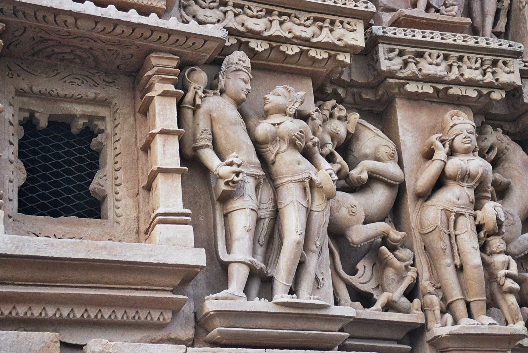 Khajuraho Temple, India Templo de Khajuraho, India. Picture take by User:Airunp